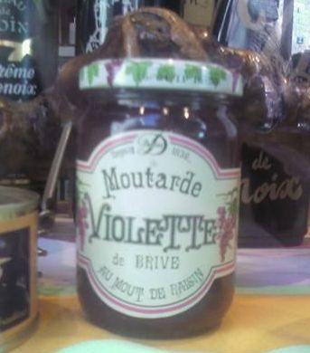 Mostassa violeta de Briva, a Occitània, feta amb grans de mostassa negra i most de vi